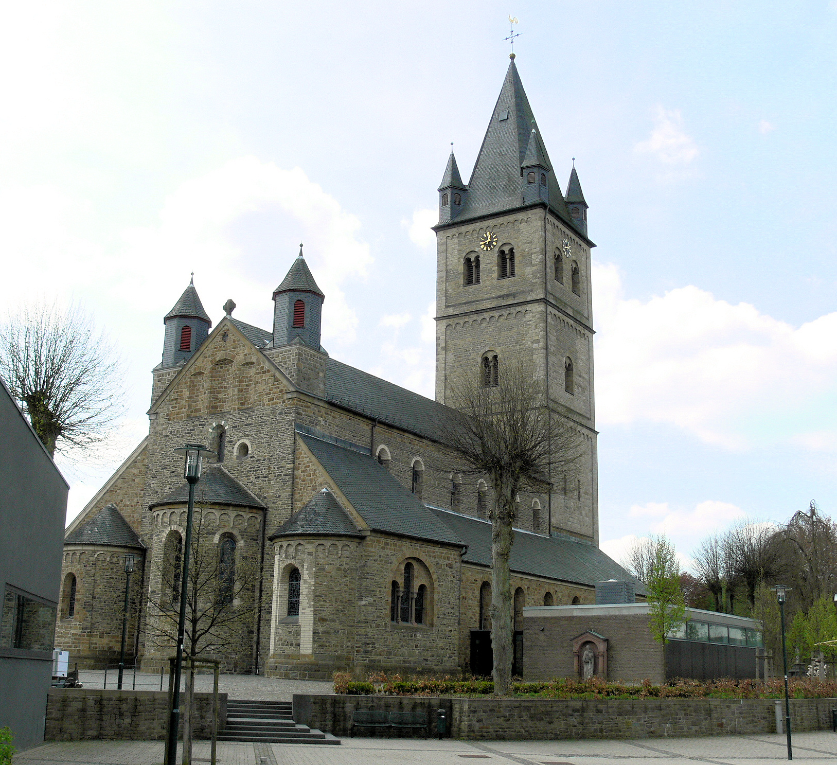 Wipperfürther Pfarrkirche St. Nikolaus vom Hausmannsplatz aus